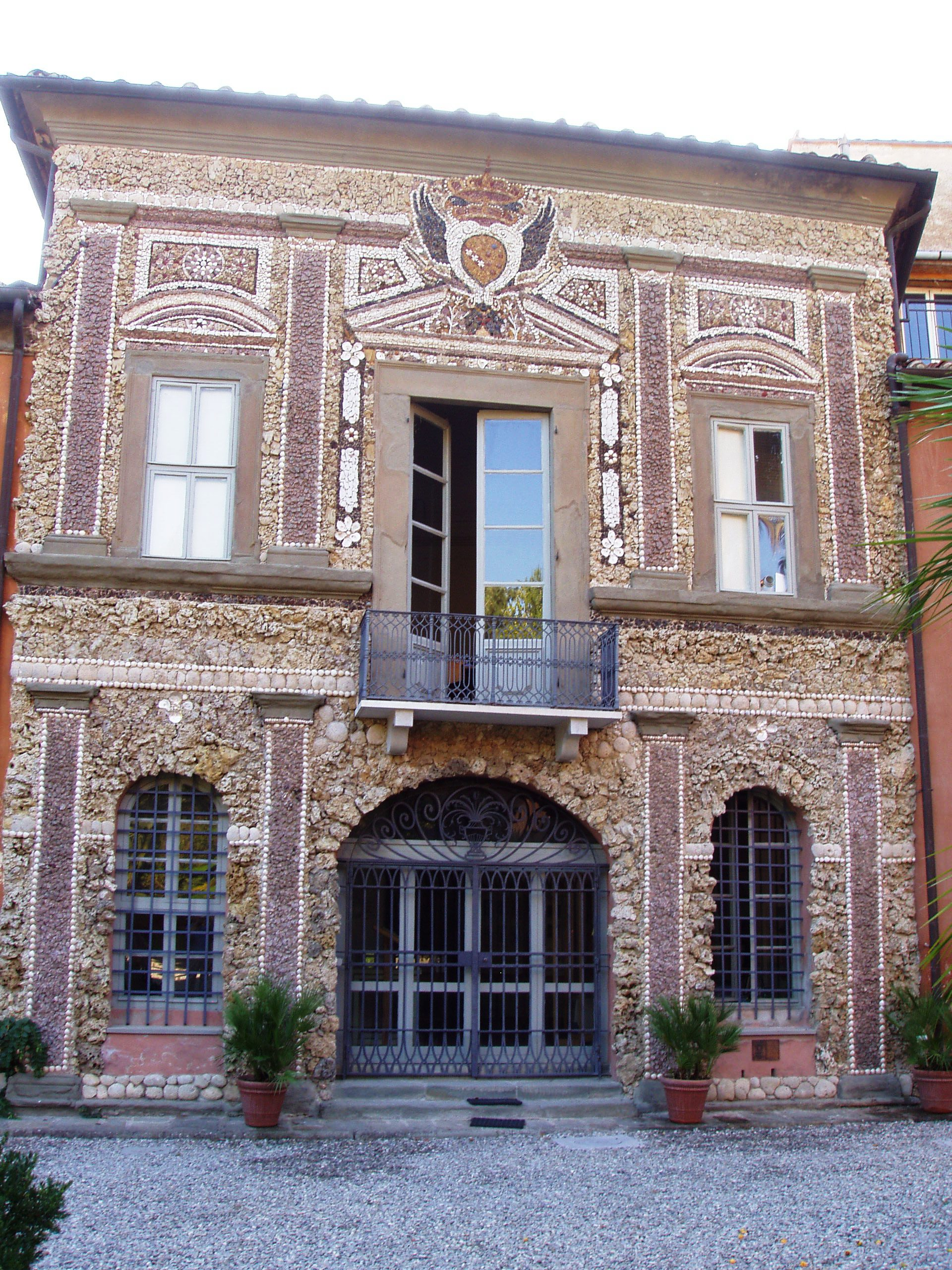 Orto botanico di Pisa - old institute building. Pisa, Italy.